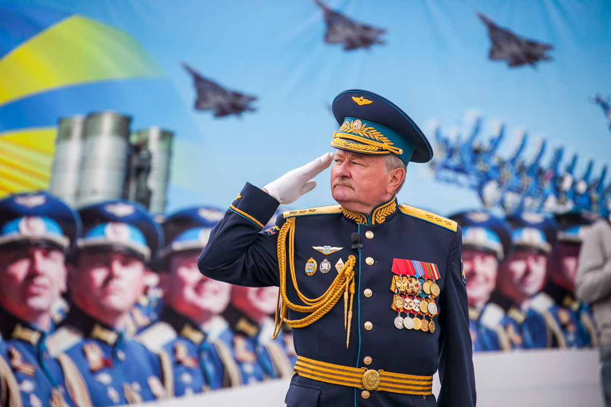 Выпуск офицеров Военного учебно-научного центра Военно-воздушных сил «Военно-воздушная орденов Ленина и Октябрьской Революции, дважды Краснознамённая, ордена Кутузова академия имени профессора Н. Е. Жуковского и Ю. А. Гагарина» в Воронеже. Начальник центра генерал-полковник Геннадий Васильевич Зибров